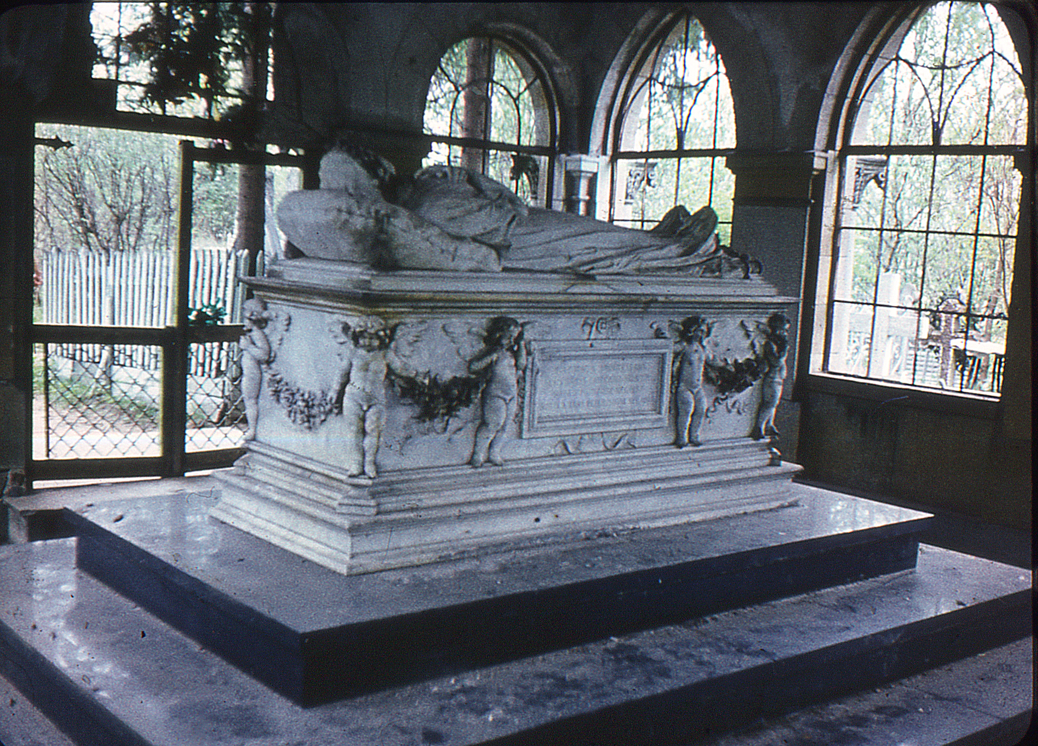 Павловск. Кладбищенский склеп XIX в.внутри